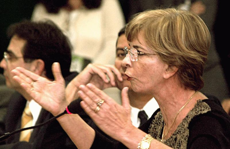 A deputada Yeda Crusius fala na reunião da Comissão Especial sobre a reforma da Previdência.